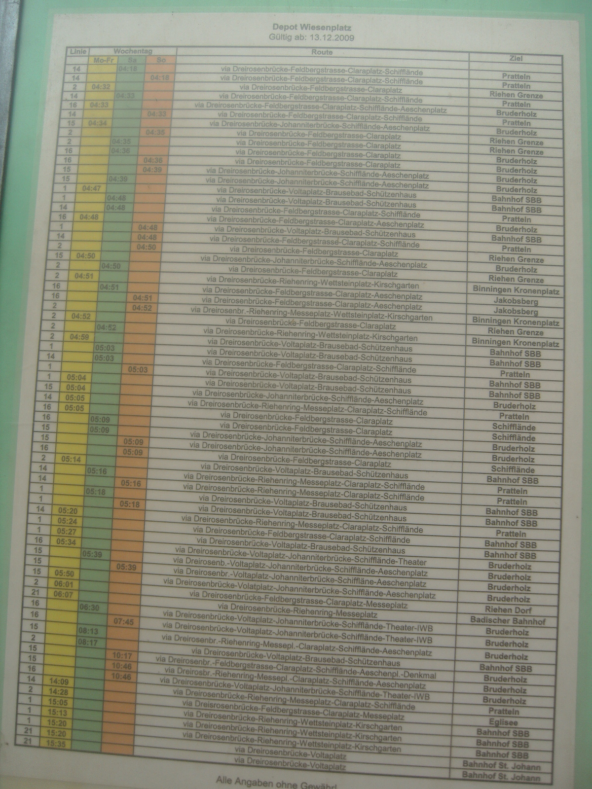 Trams-Ausfahrt Fahrplan in BVB Depot "Wiesenplatz" in 2010.